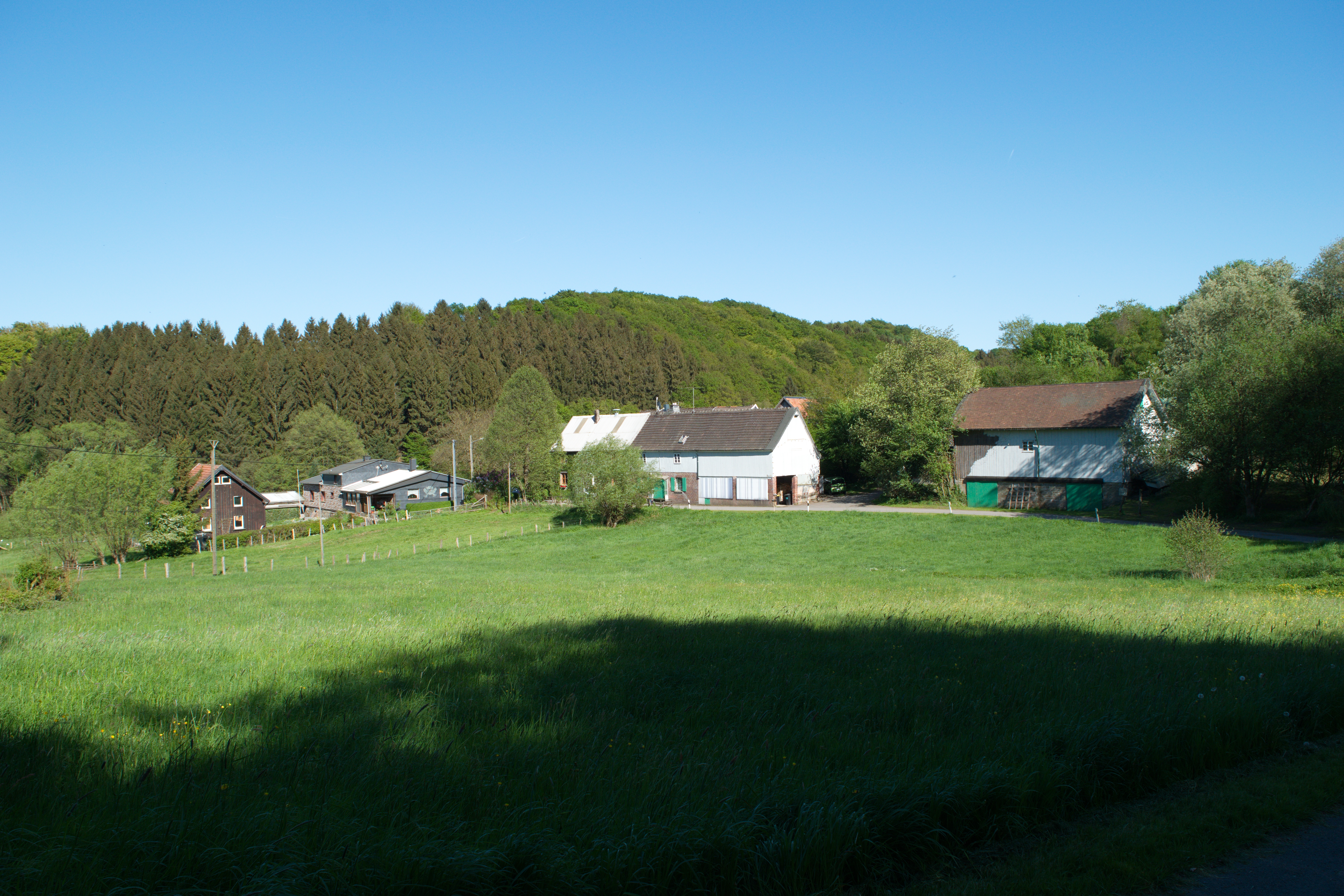 Kleinsporkert, Wuppertal